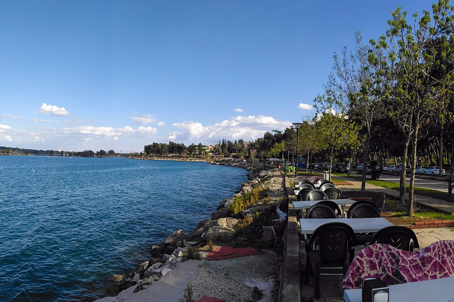 Menderes Bulvarı ve Seyhan Baraj Gölü. (foto: Resul Gül)